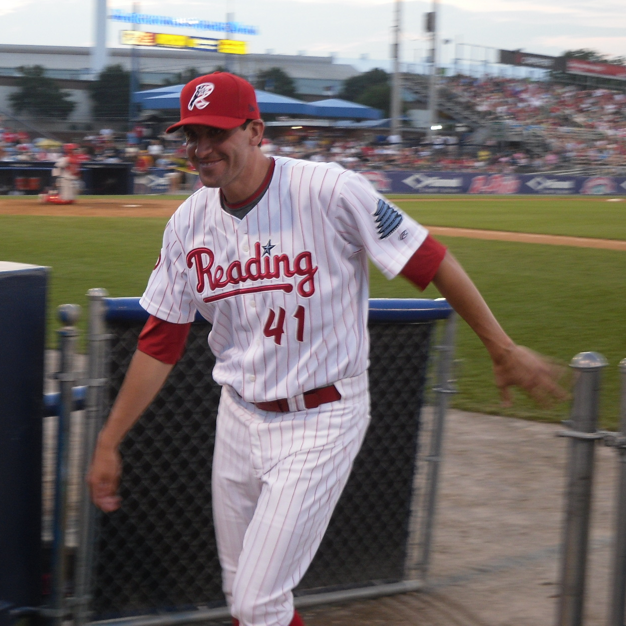 Ty Taubenheim